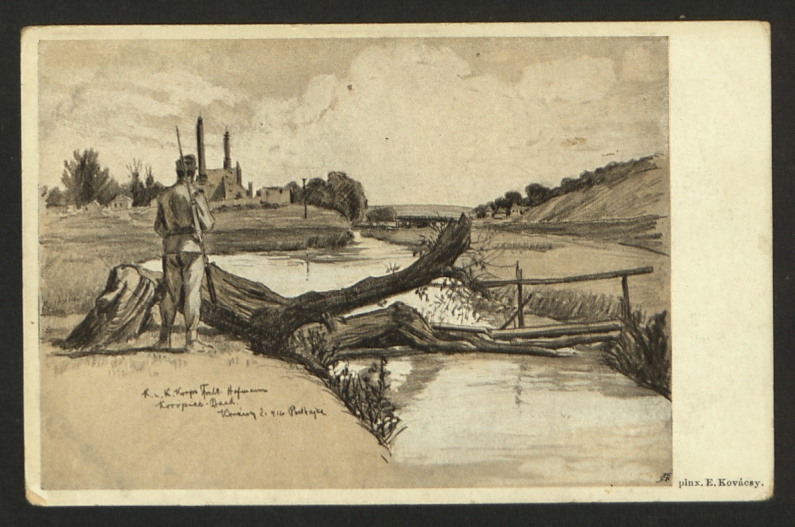 Żołnierz stojący nad rzeką Koropiec w Podhajcach (Podhajce, Підгайці). Pocztówka 1916